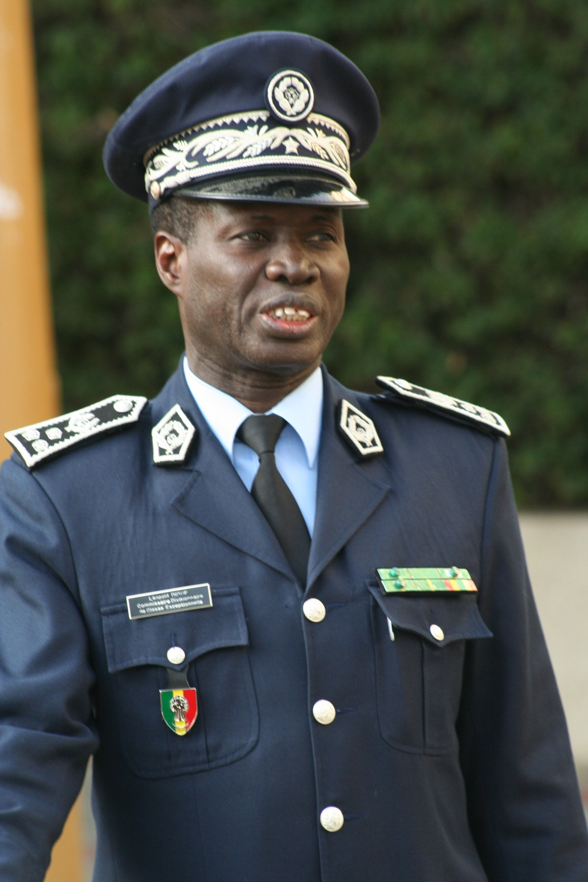 Léopold Diouf, commmissaire divisionnaire et ancien directeur de la Sûreté nationale